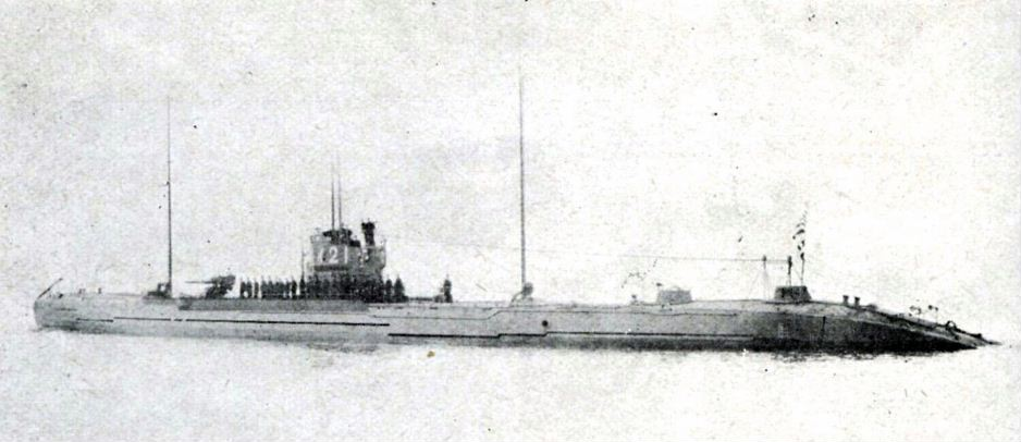 伊号第二十一潜水艦 (I-21 submarine)